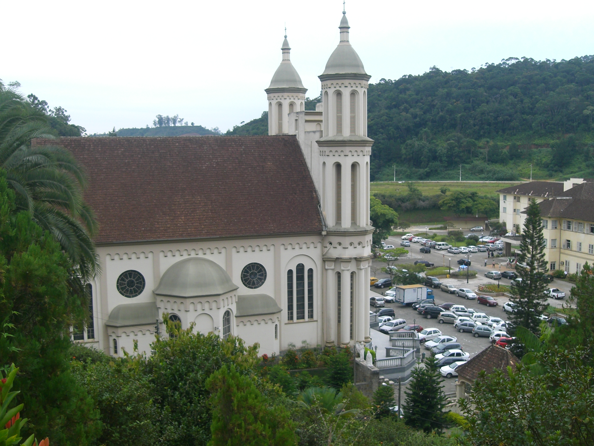 Santuário Nossa Senhora de Azambuja (Brusque)